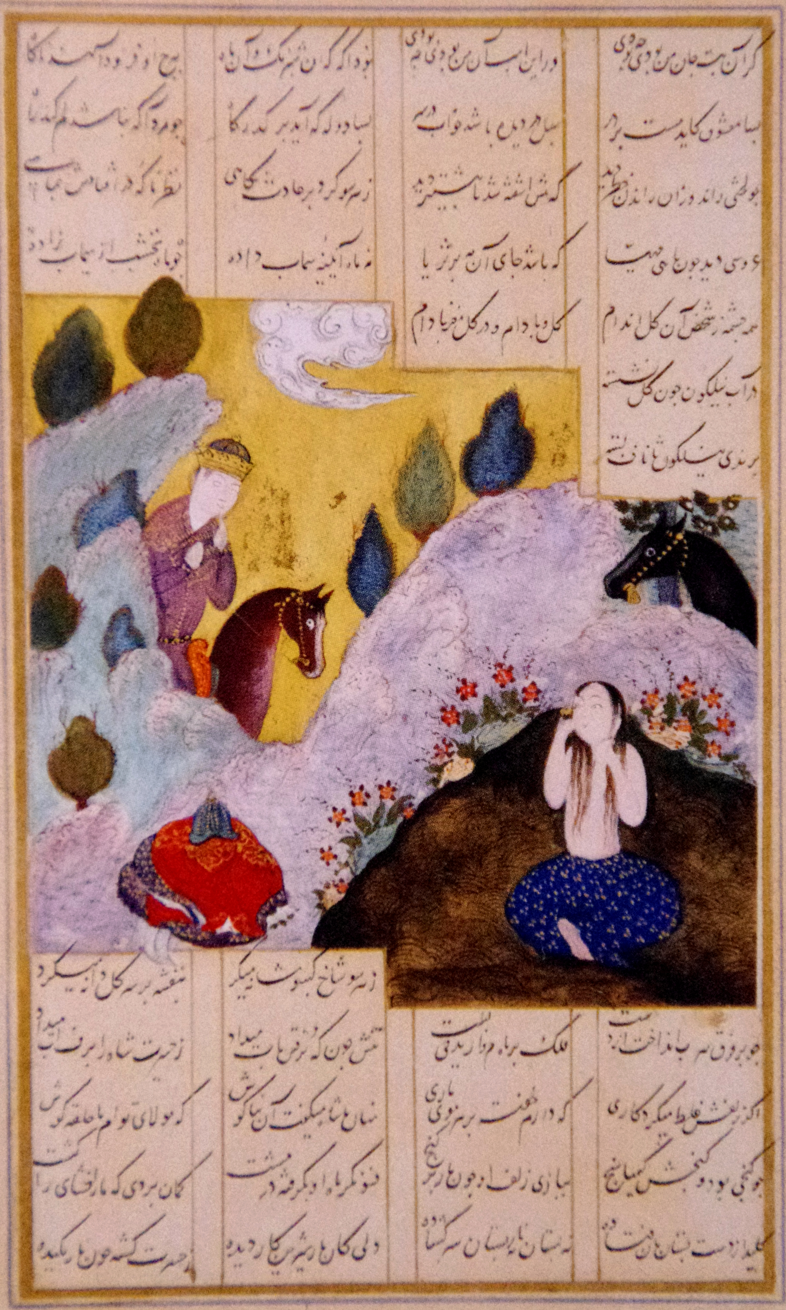 Çeçmə başında Şirin, Nizami Gəncəvi, Xəmsə, "Xosrov və Şirin", Behzad minyatur məktəbi, 1479, eni 11 sm, hündürlüyü 18,5 sm, Nizami Gəncəvi adına Milli Azərbaycan Ədəbiyyatı Muzeyi, Bakı, Nr. 1161/J